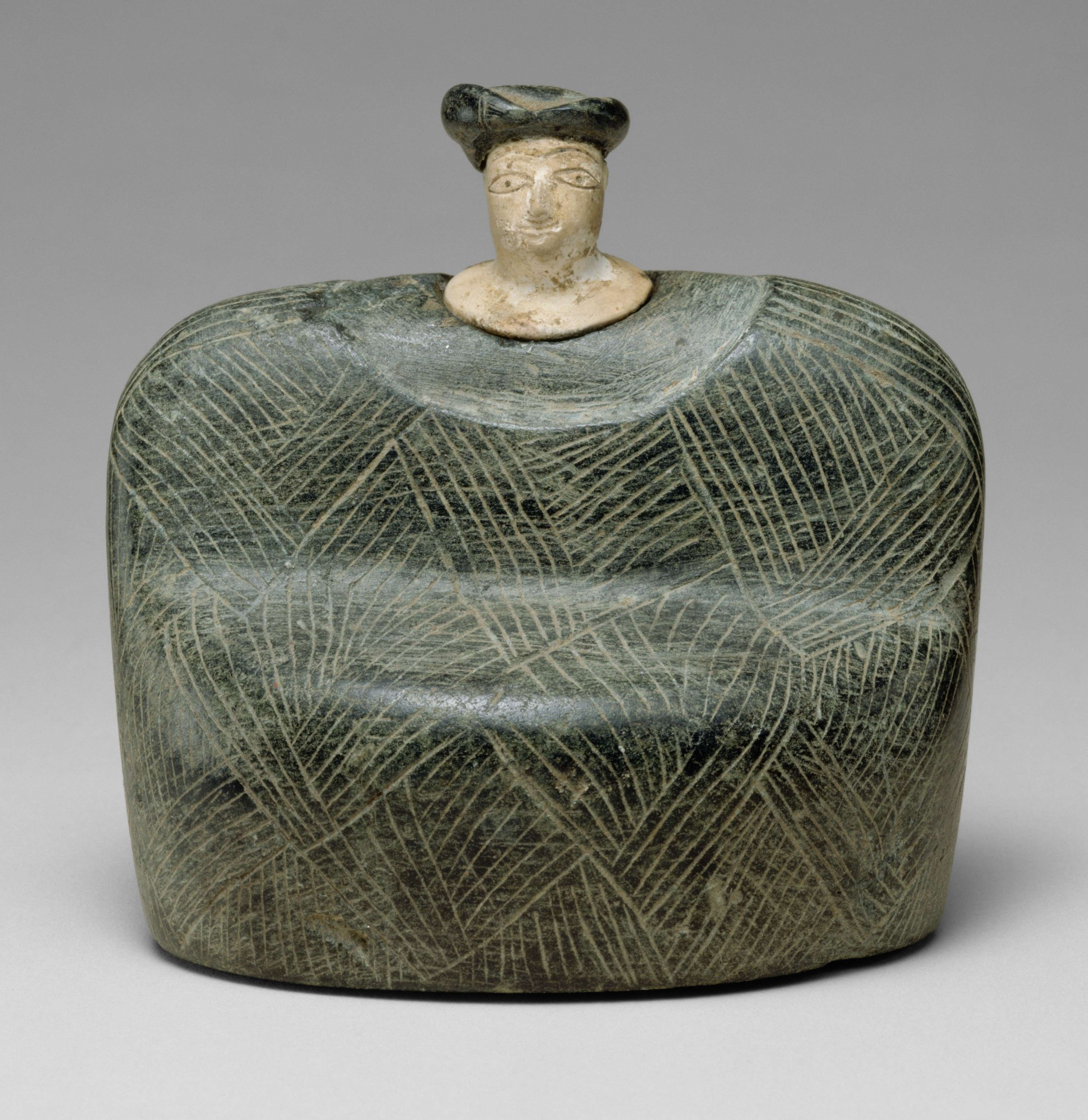 Bactria-Margiana Archaeological Complex; Sculpture; Stone-Sculpture